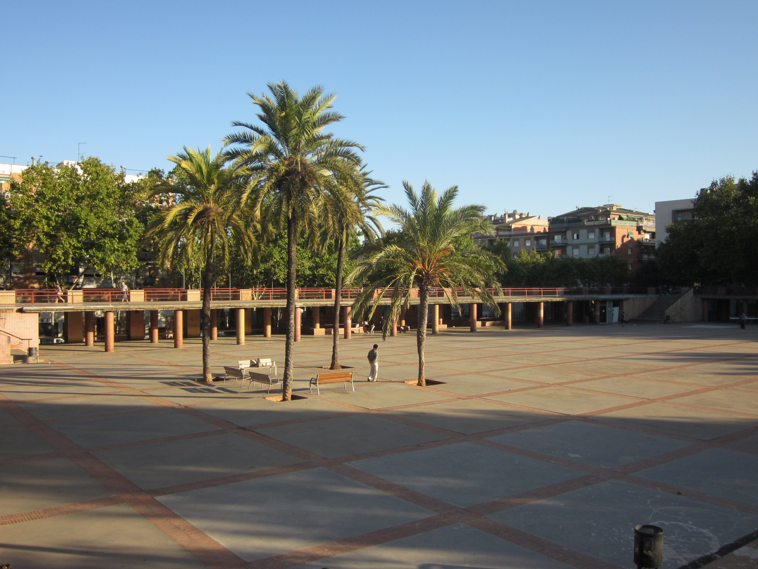 Plaza Sóller, Nou Barris, Barcelona.